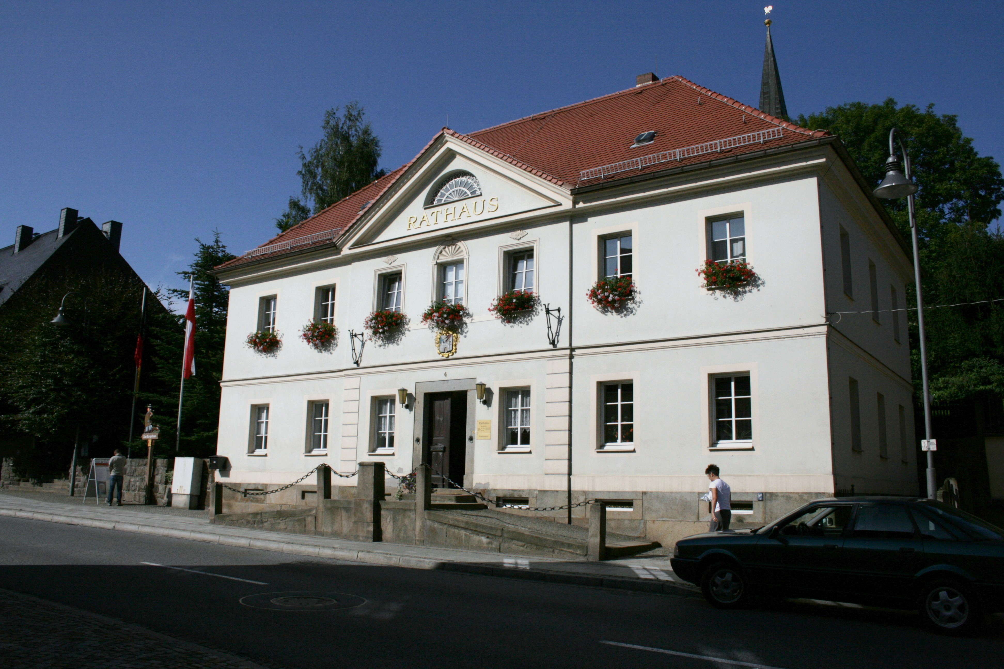 Rathaus an der Hauptstraße in Schirgiswalde